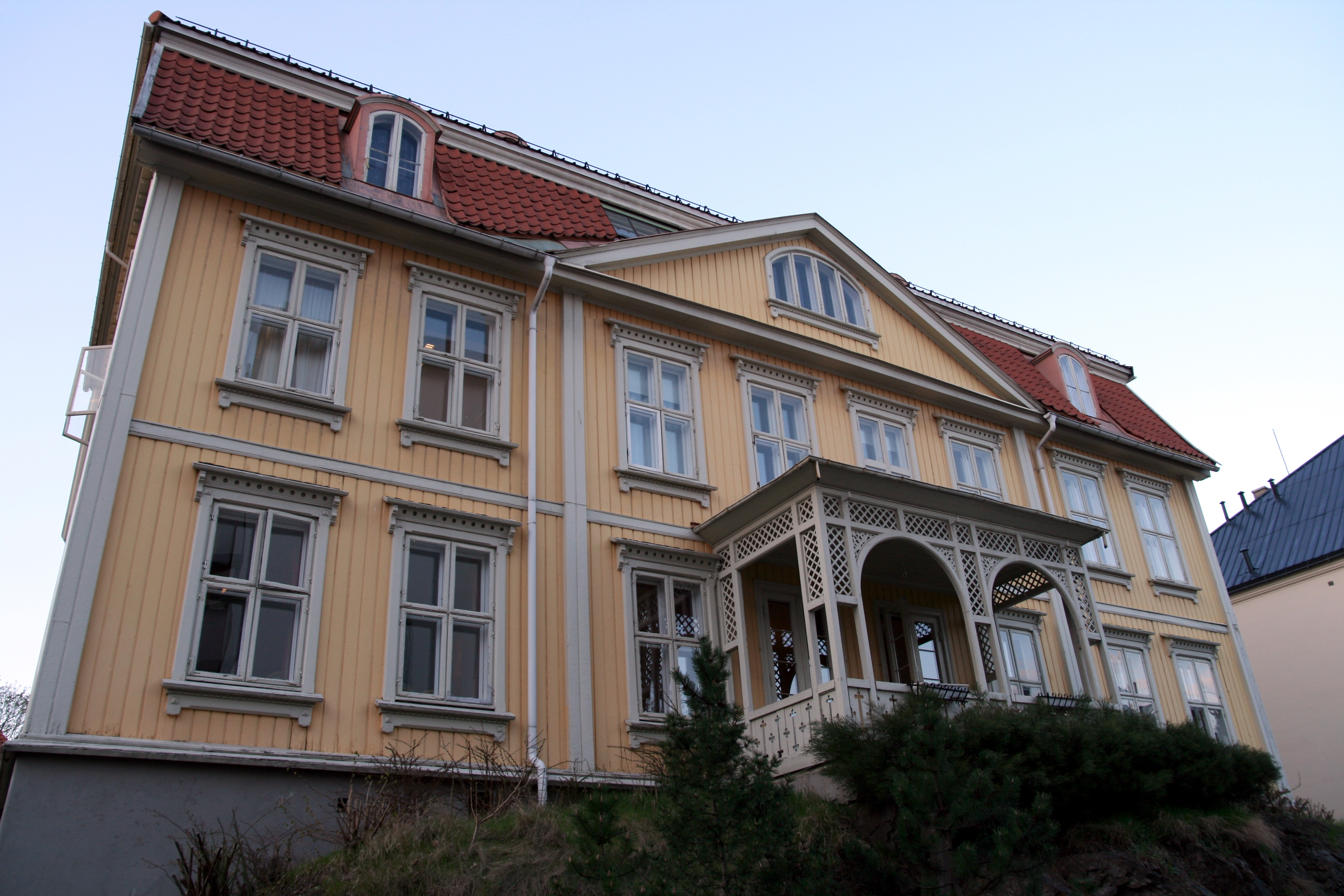 Hovedhuset på Schafteløkken på Frogner i Oslo. Huset et empirehus fra omkring 1807, og har adresse Zahlkasserer Schafts plass 1.